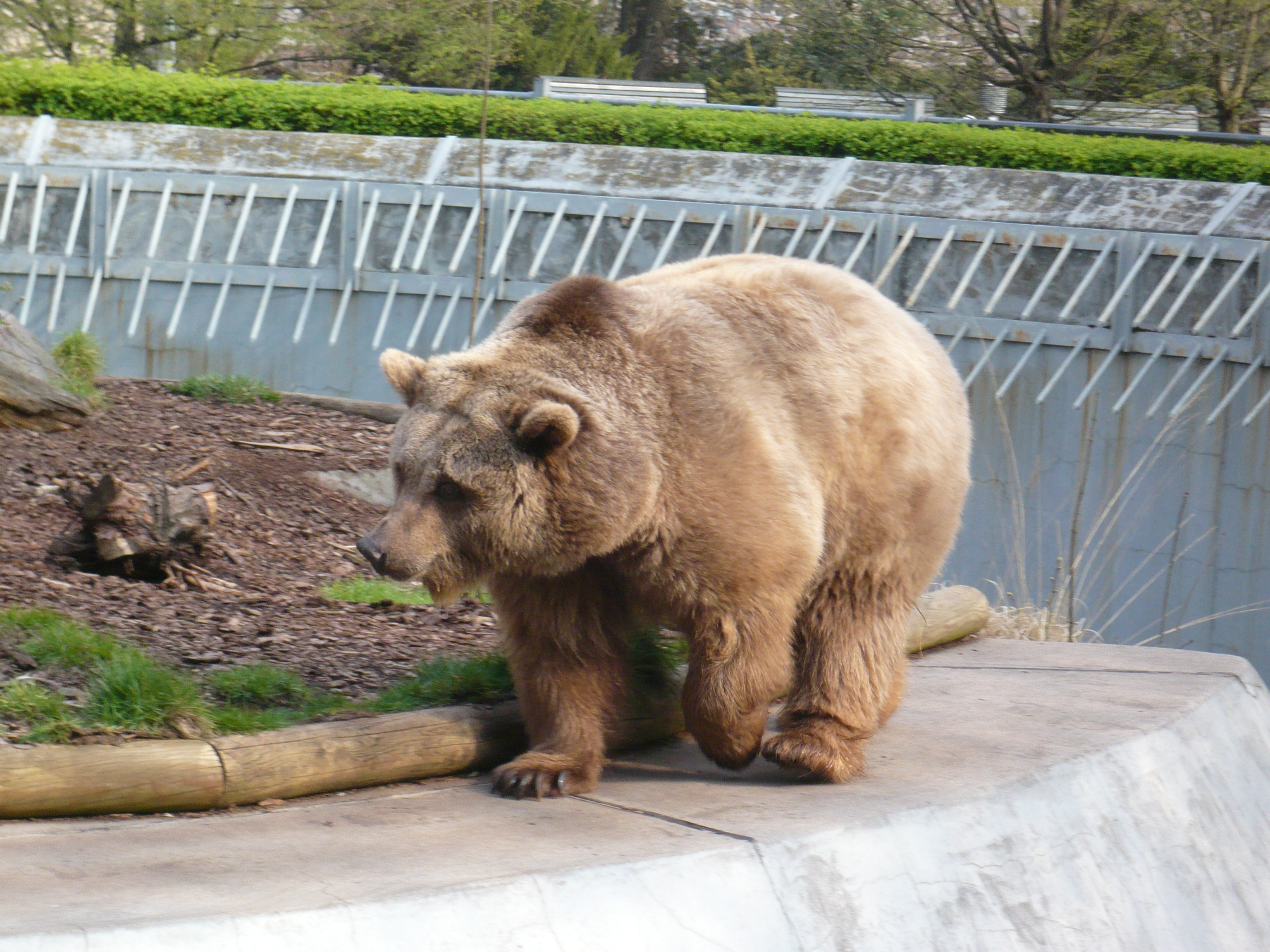 Berlin-Mitte; Bärenzwinger am Köllnischen Park